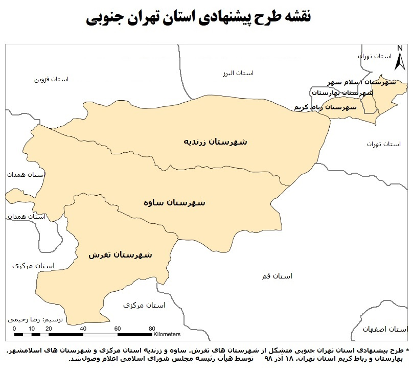 map of southern tehran